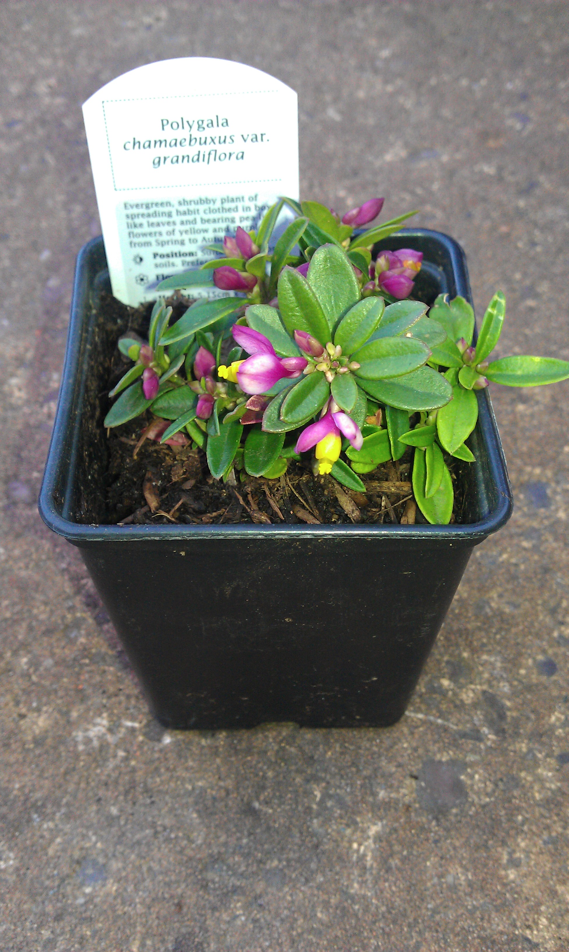 Polygala chamaebuxus var. Grandiflora